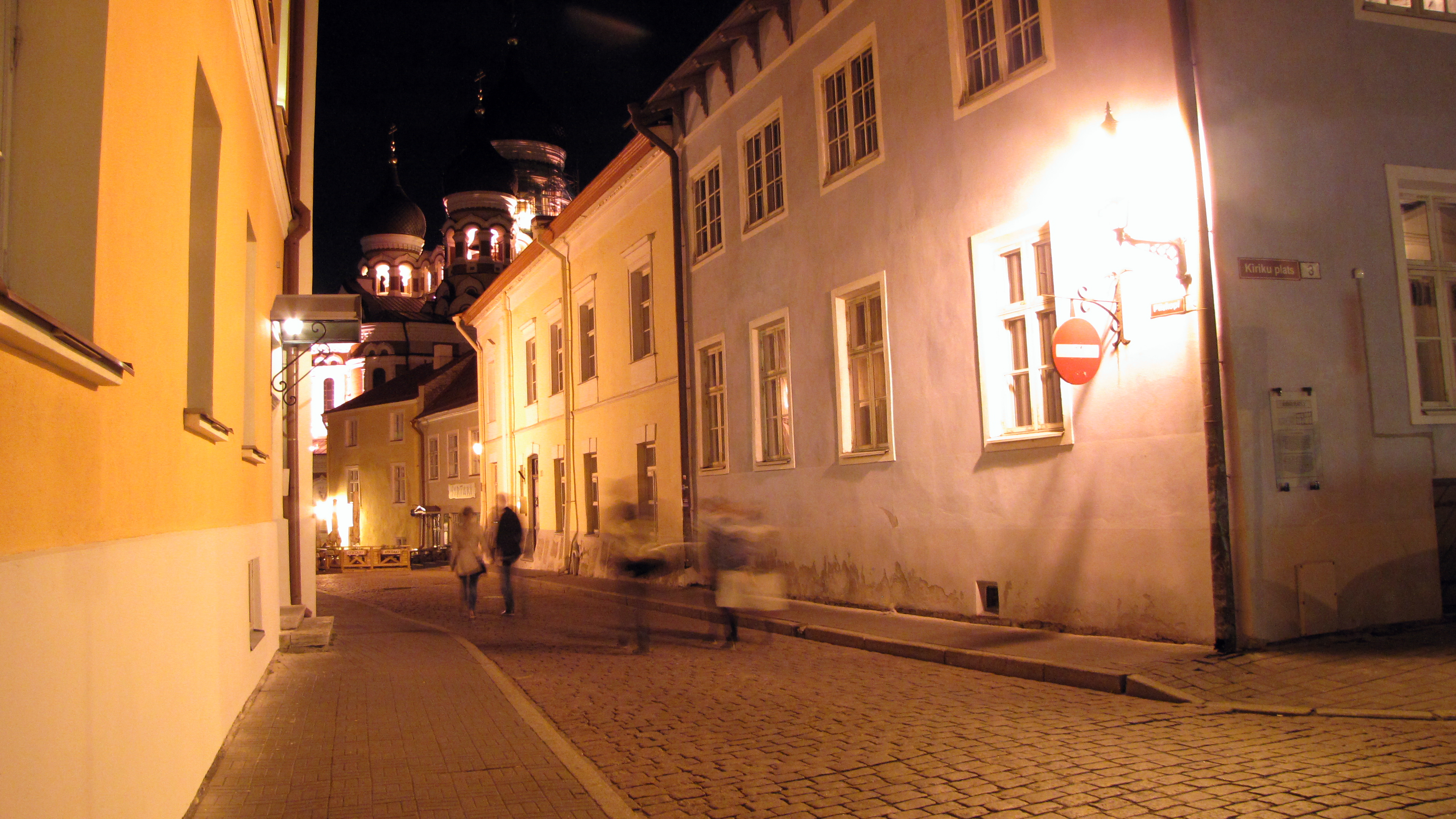 Piiskopi tn. Tallinna vanalinn